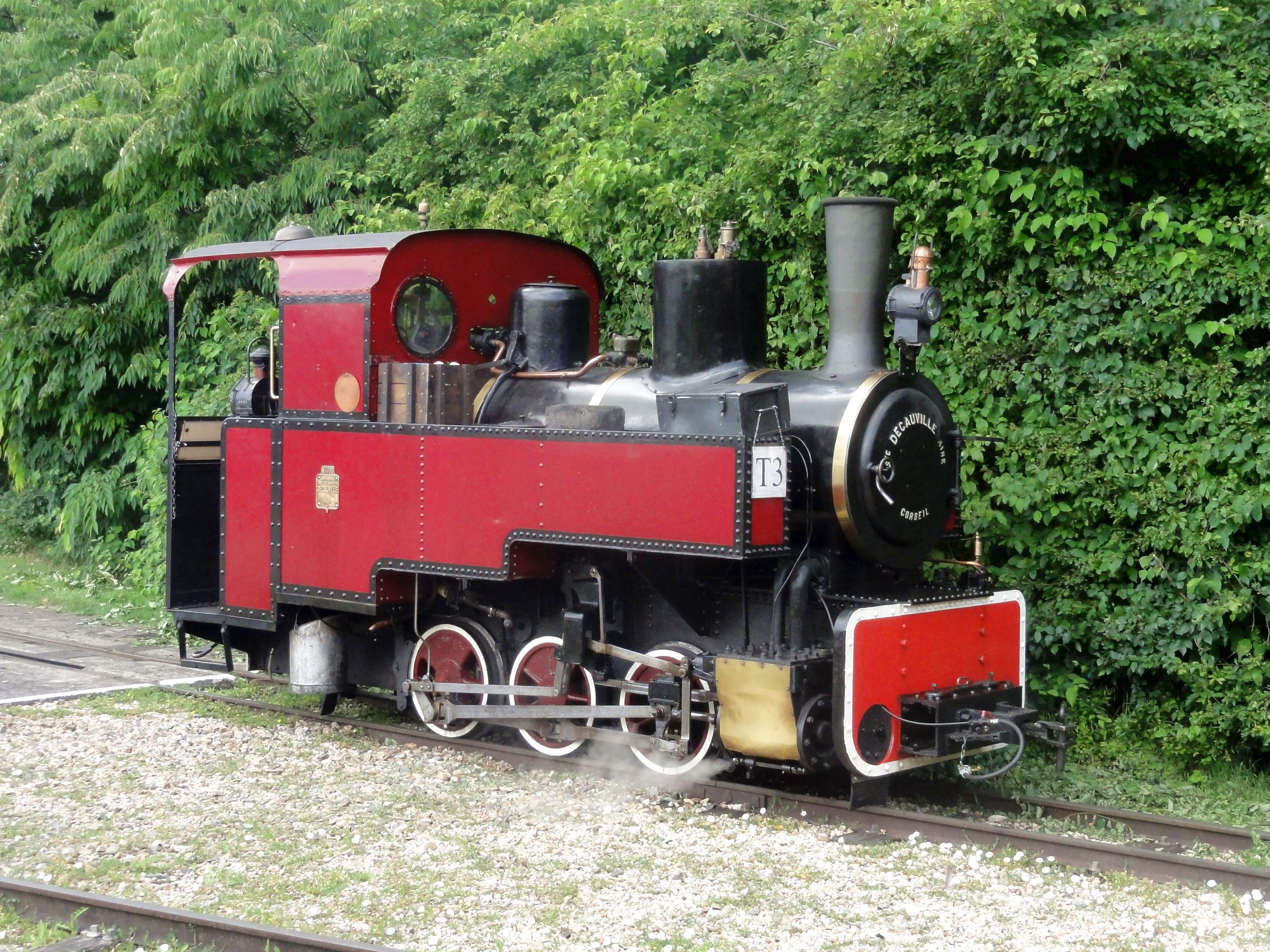 030 T n° 6, Decauville 1920 / n° 1770 (chaudière n° 5750).